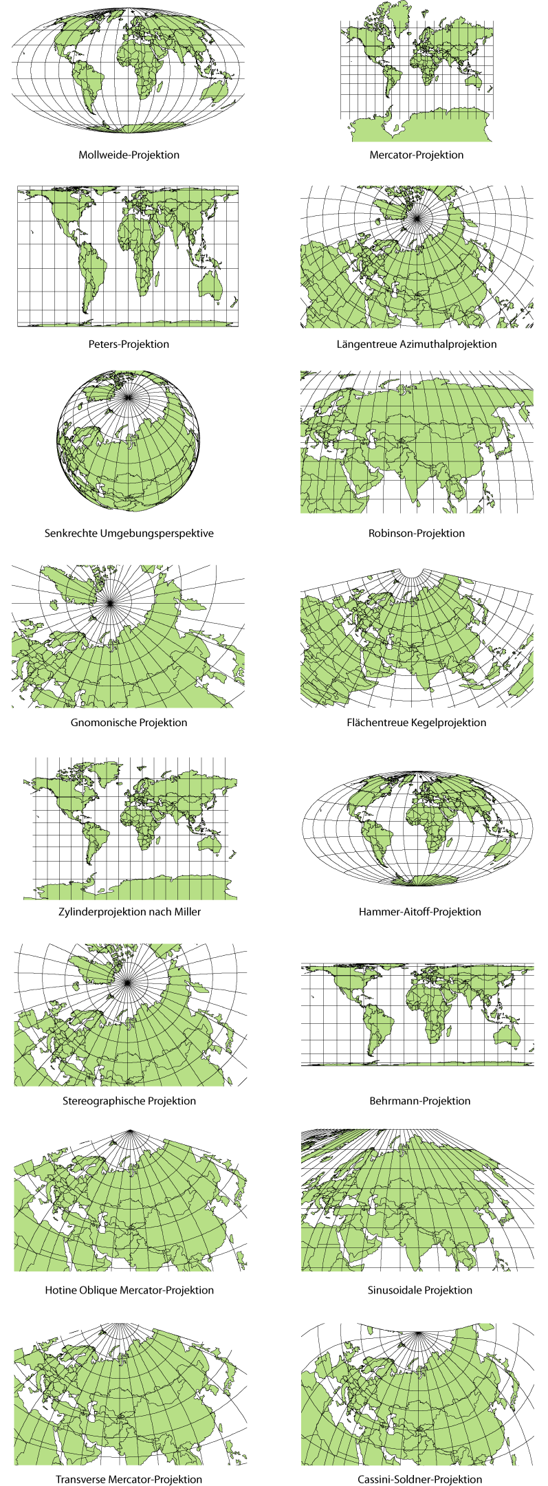 Vergleichende Darstellung ausgewählter Kartenprojektionsarten. Die runde Erde auf einem flachen Stück Papier abzubilden ist seit Anfang an mit die größte Herausforderung der Kartographie. Auf welch vielfältige Weise diese bewältigt werden kann, wird in dieser vergleichenden Übersicht der unterschiedlichen Kartenprojektionsarten vor Augen geführt. Erstellt wurde die Darstellung mit der MapTools-Extension von ESRI ArcView, die dann einer Überarbeitung in Adobe Illustrator unterzogen wurde.